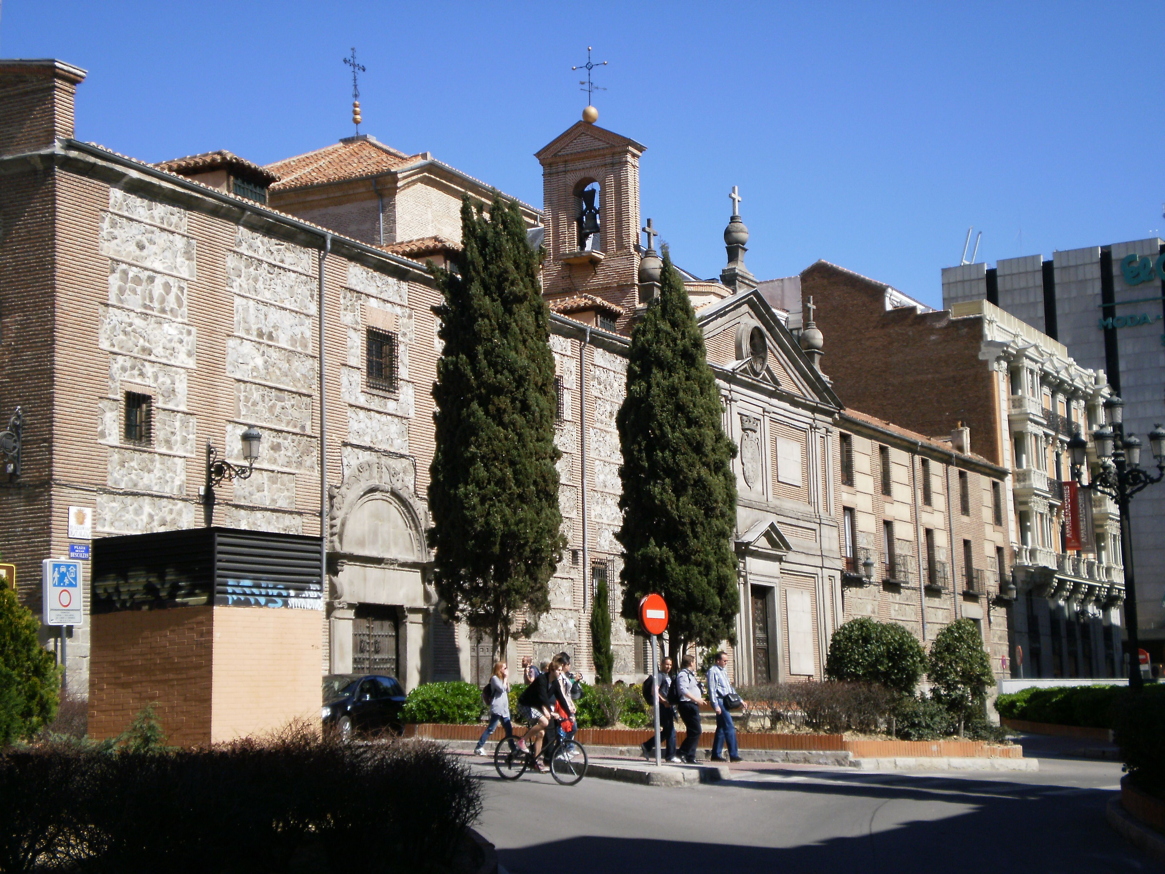 Convent of Las Descalzas Reales, Madrid